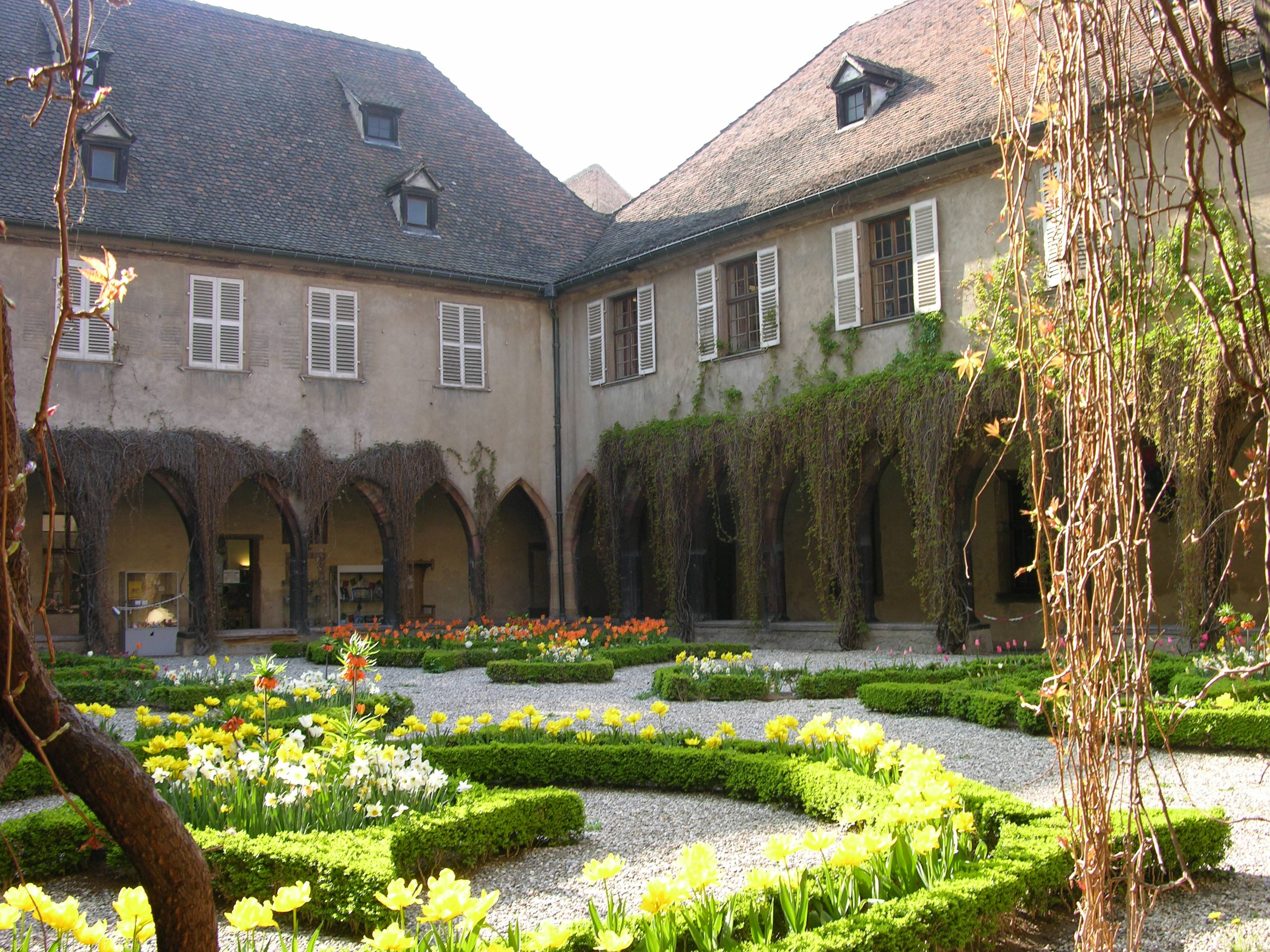 couvent des Dominicains de Colmar, cloître, 2010